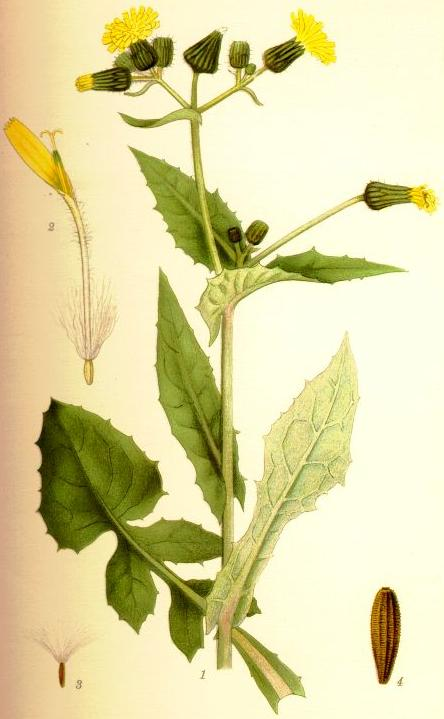 Kålmolke (Sonchus oleraceus) växtens översta del jämte ett blad från nedre delen, blomma (4/1), frukt (2/1), frukt med avfallen hårpensel (8/1).